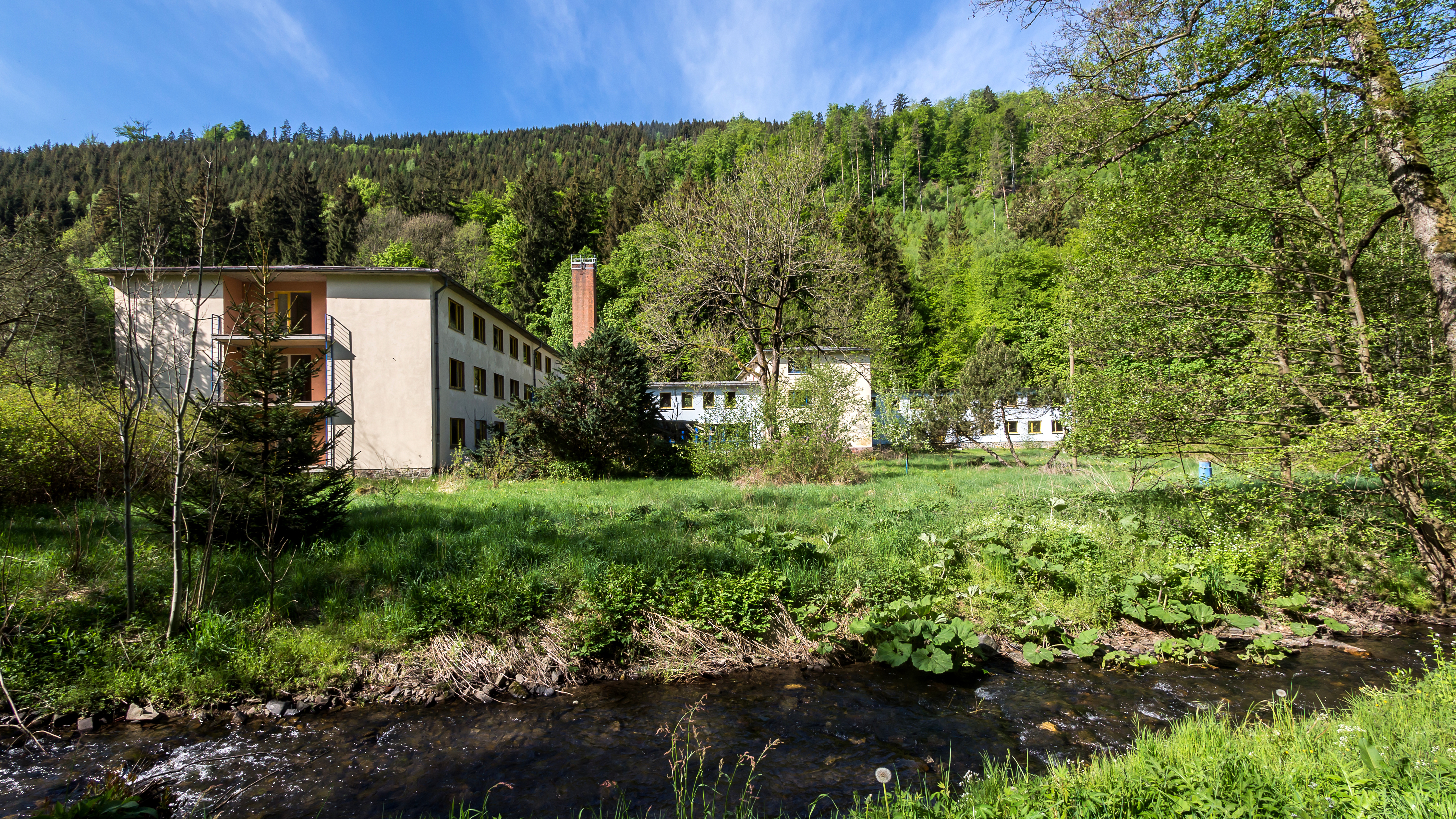 Döschnitz Ortsstraße 56 Wald - und Jugendhotel Sorbitzmühle